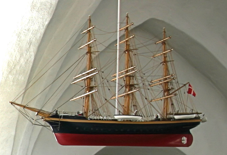 Ølsemagle Kirke, near Køge, Denmark. Model of ship, "Georg Stage".